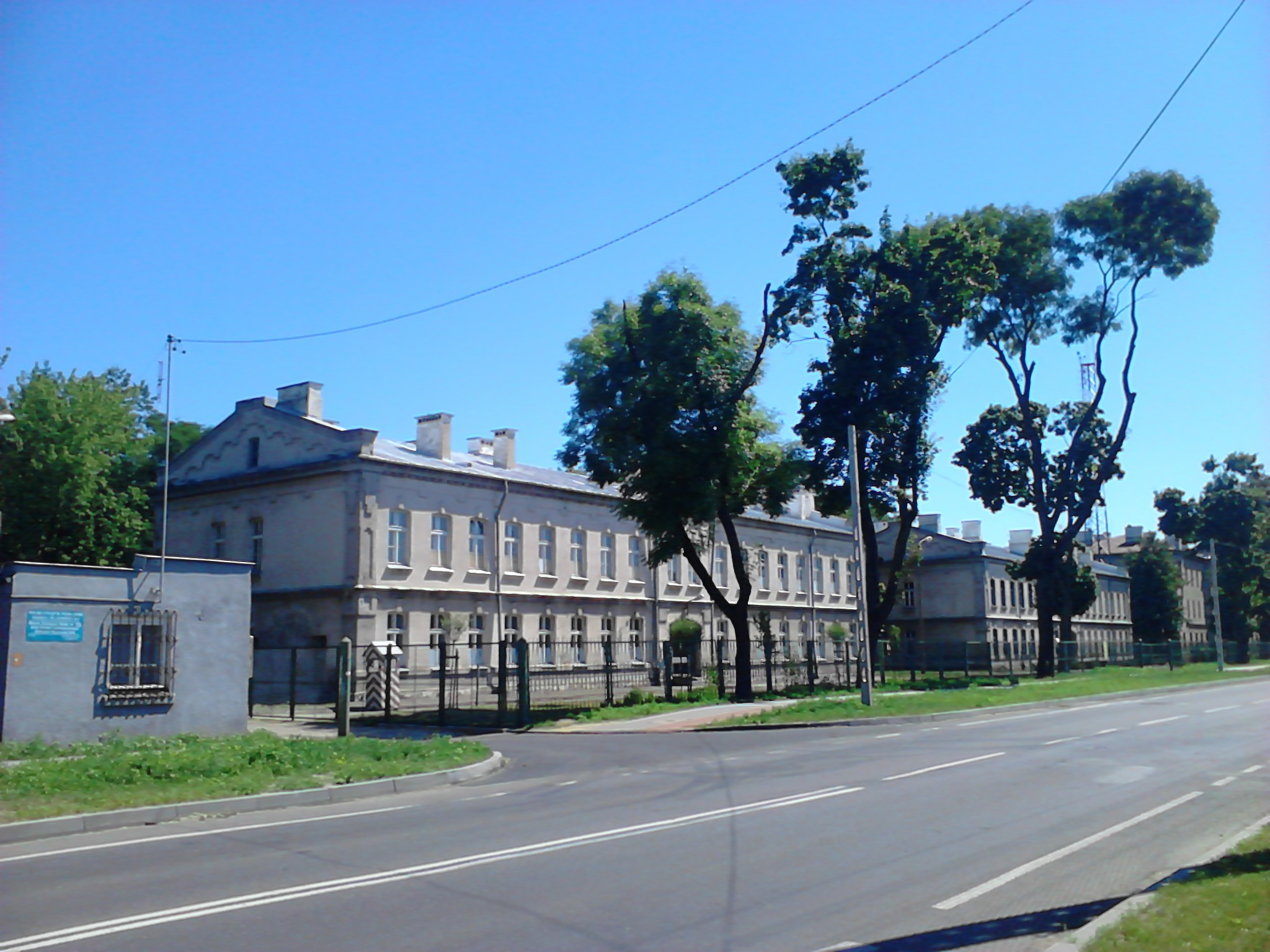 Dawne koszary rosyjskie w Przasnyszu, obecnie zajmowane przez 2 Ośrodek Radioelektroniczny